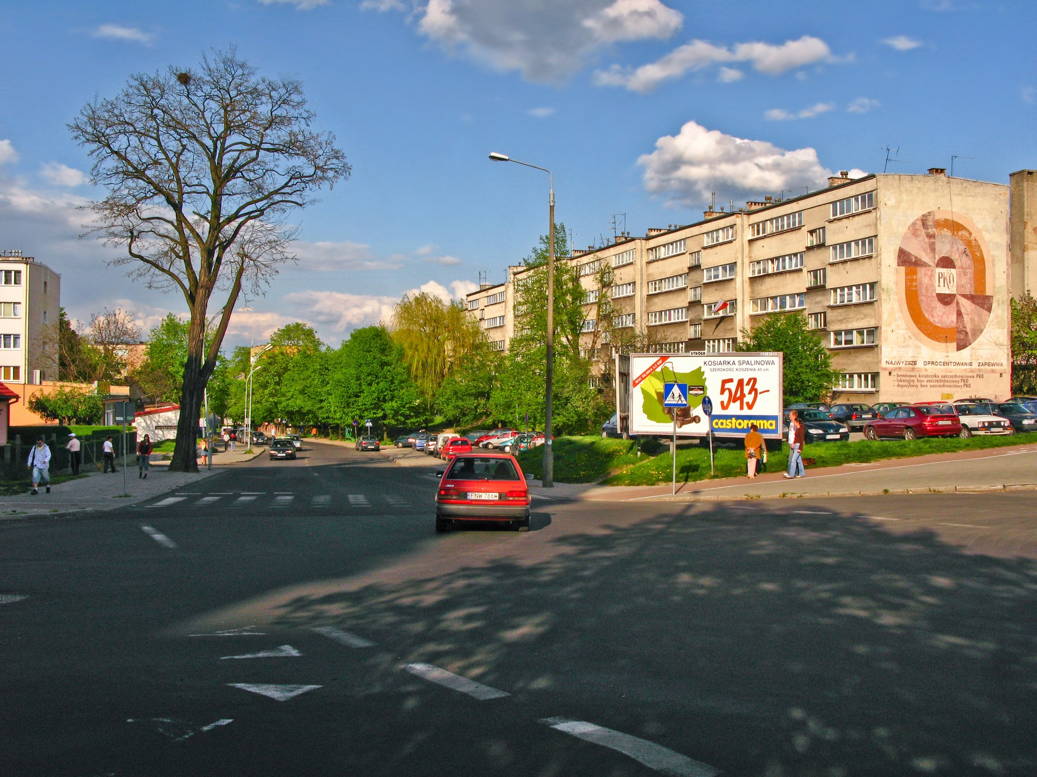 Zielona Góra, ul. Ptasia, widok od ulicy Wyszyńskiego